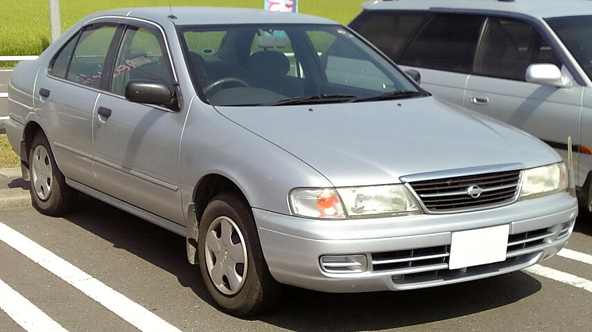 B14型日産・サニー